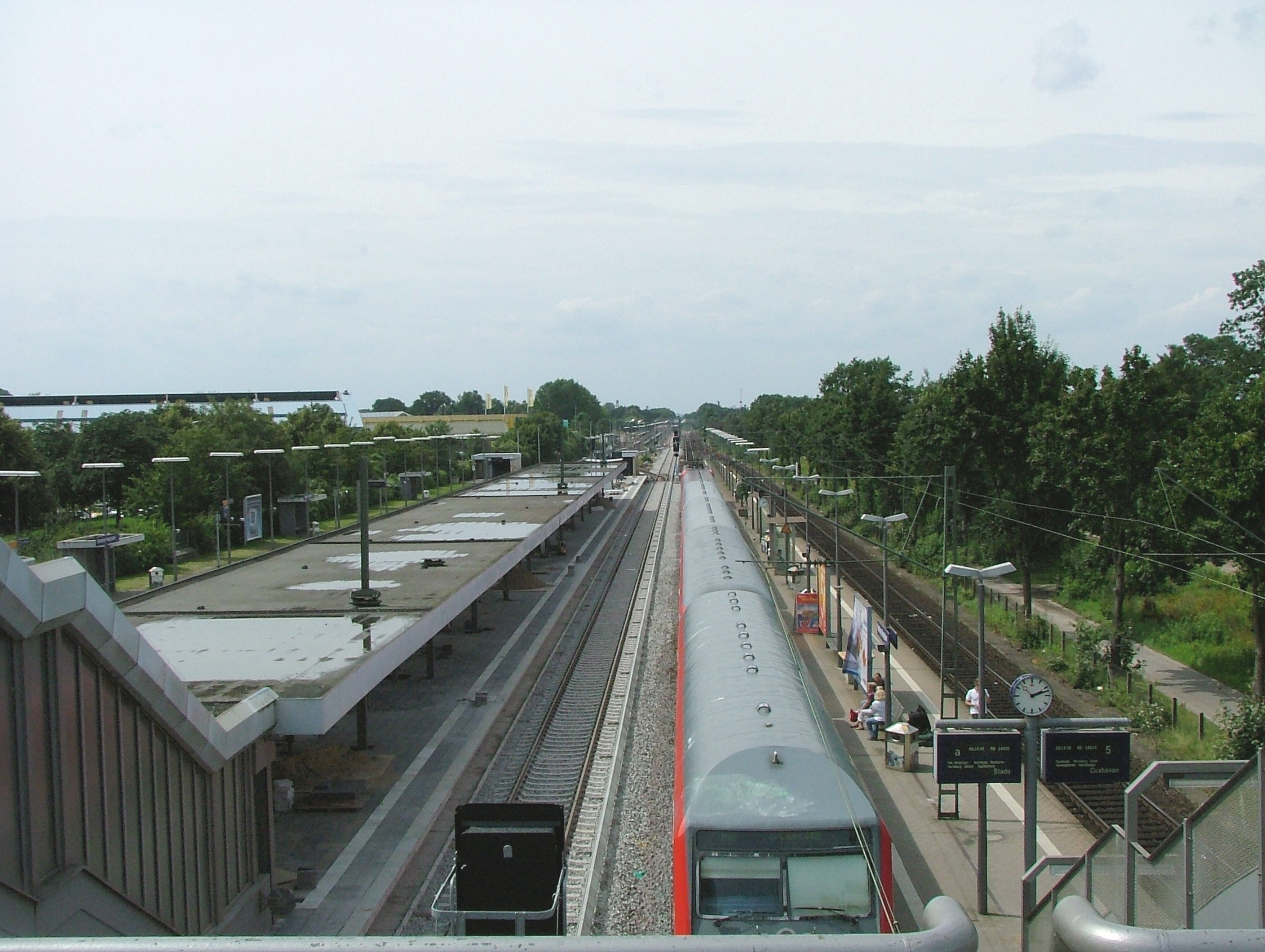 Der S- und Regionalbahnhof Hamburg-Neugraben. Blick nach Westen, Fahrtrichtung Stade.